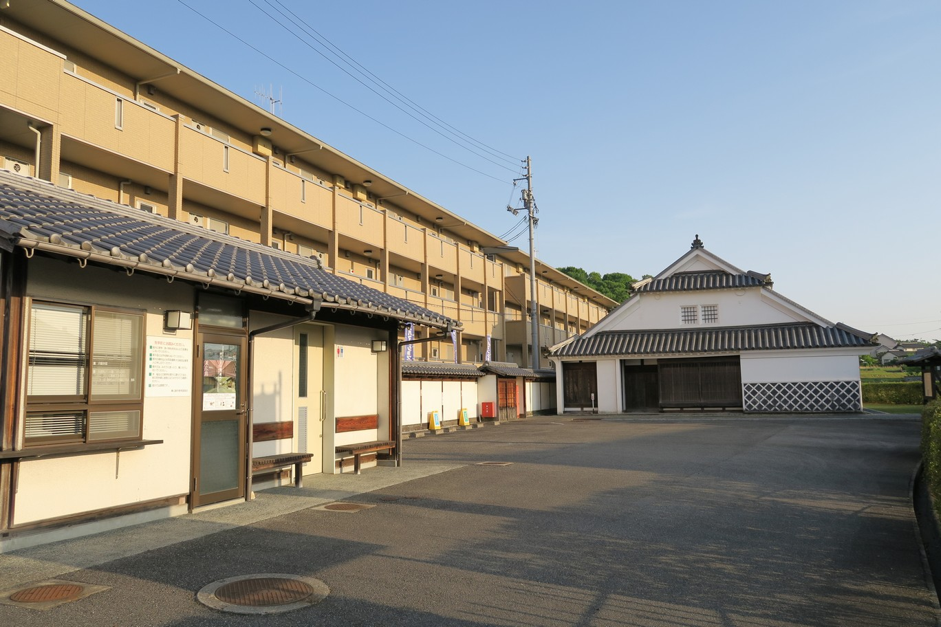 旧石井家住宅 (右奥)